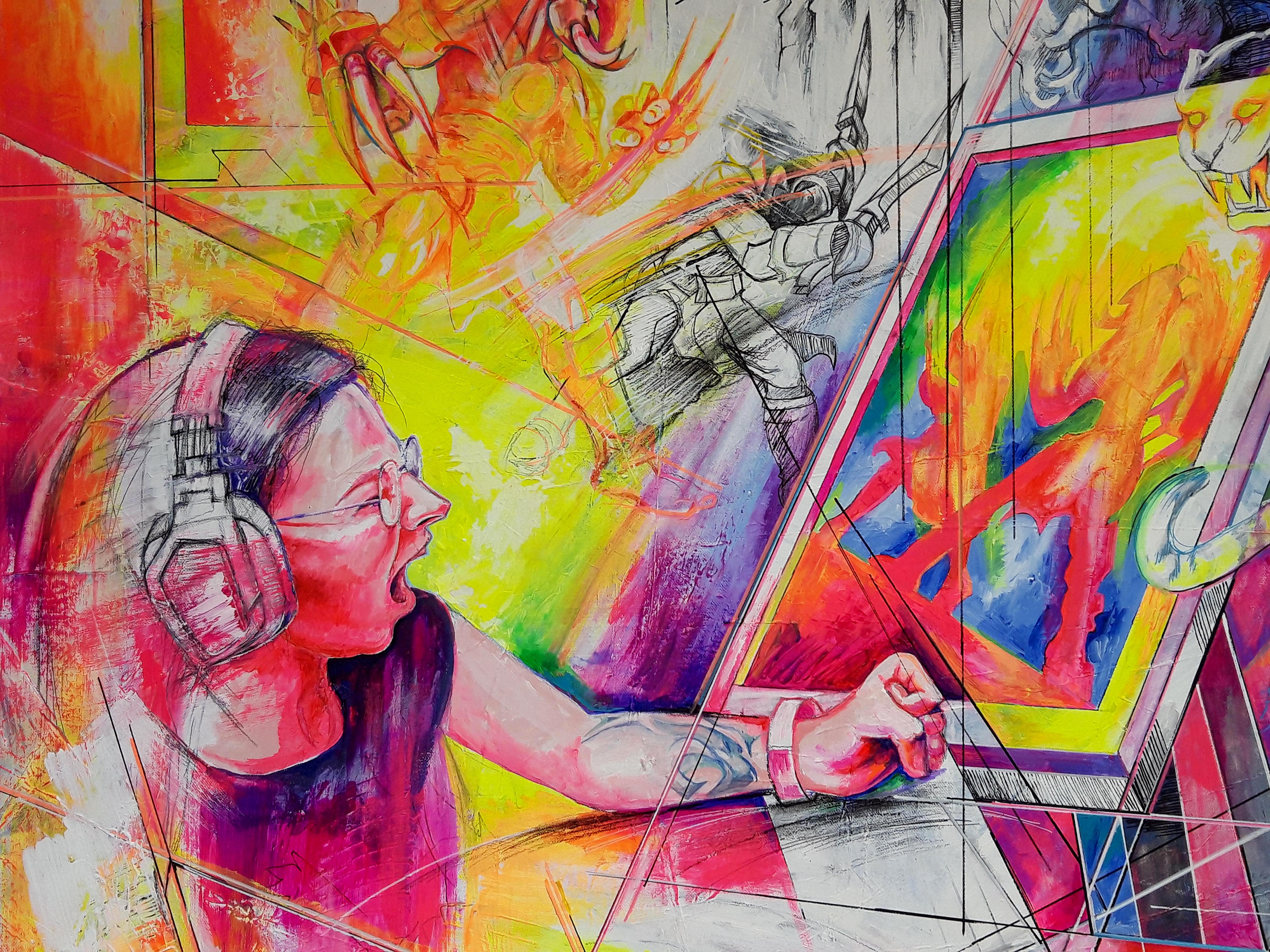 Höhlengleichnis, Gemälde in Mischtechnik, 2020, 350 x 150 cm.